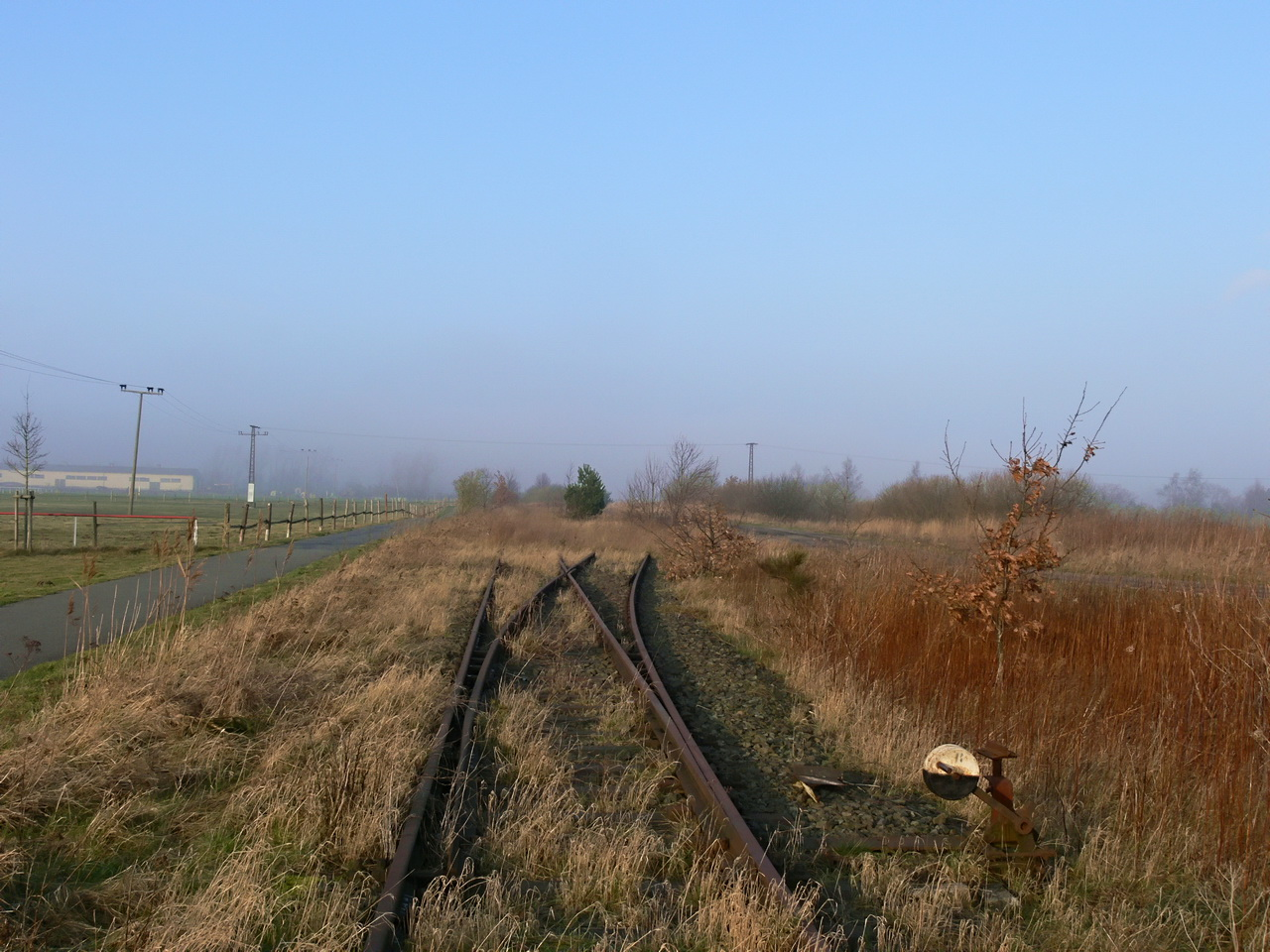 Die verlassene Bahnstrecke Velgast–Prerow.